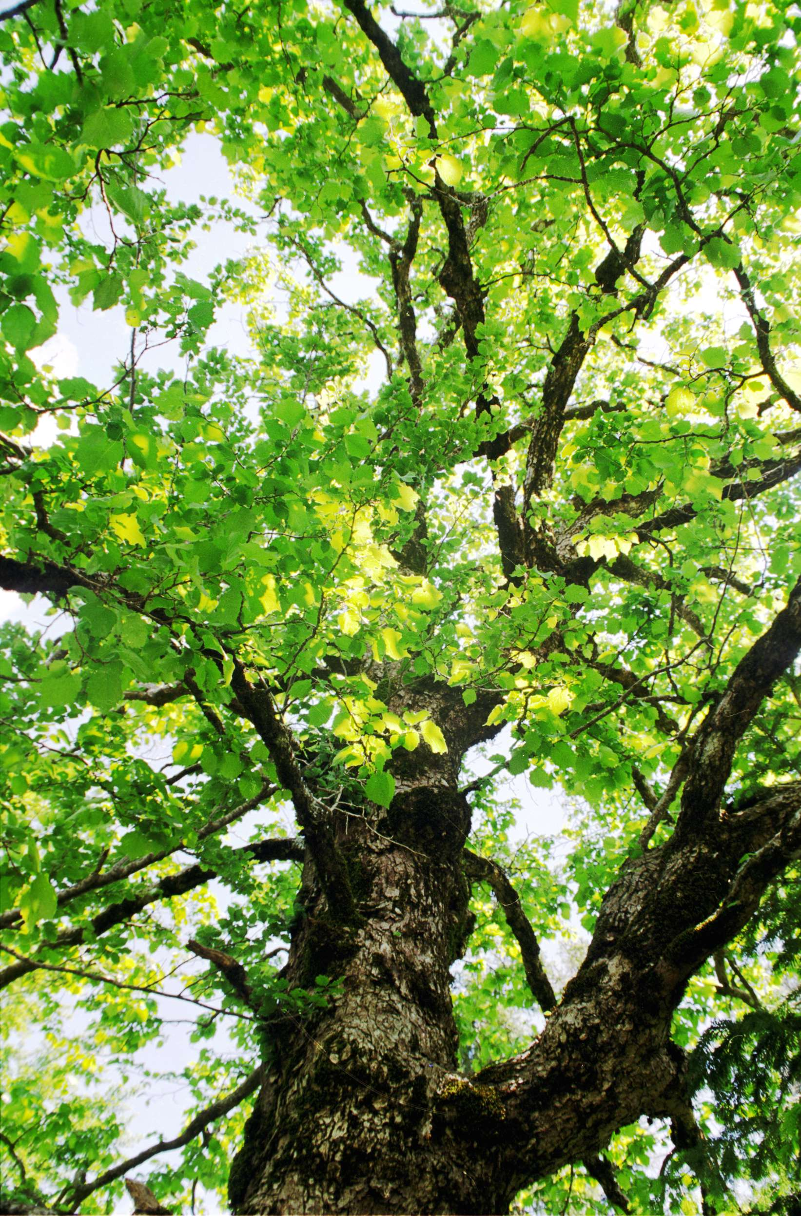 Baumhasel (Corylus colurna) aus dem „montanen Mischwald“ im Orjen, Montenegro